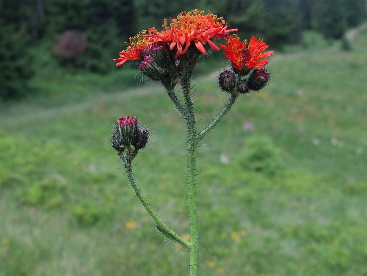 Hieracium auratniacum (habitat:Gorce, Hale Podgorcowe)